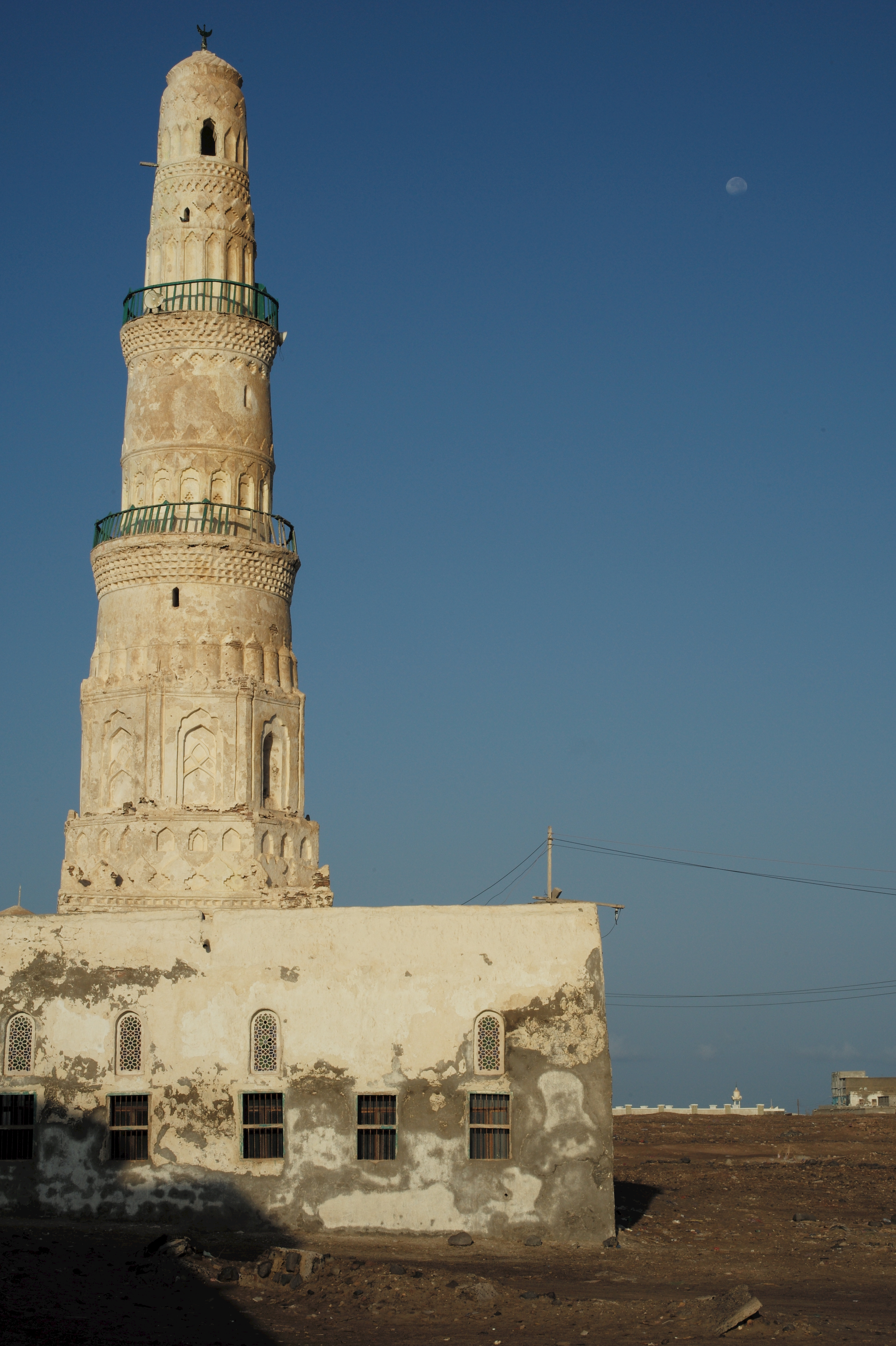 Mosque and moon